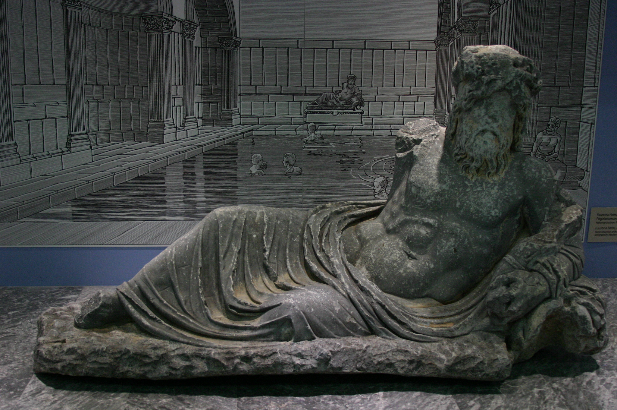 Escultura encontrada nos Banhos de Faustina, em Mileto.